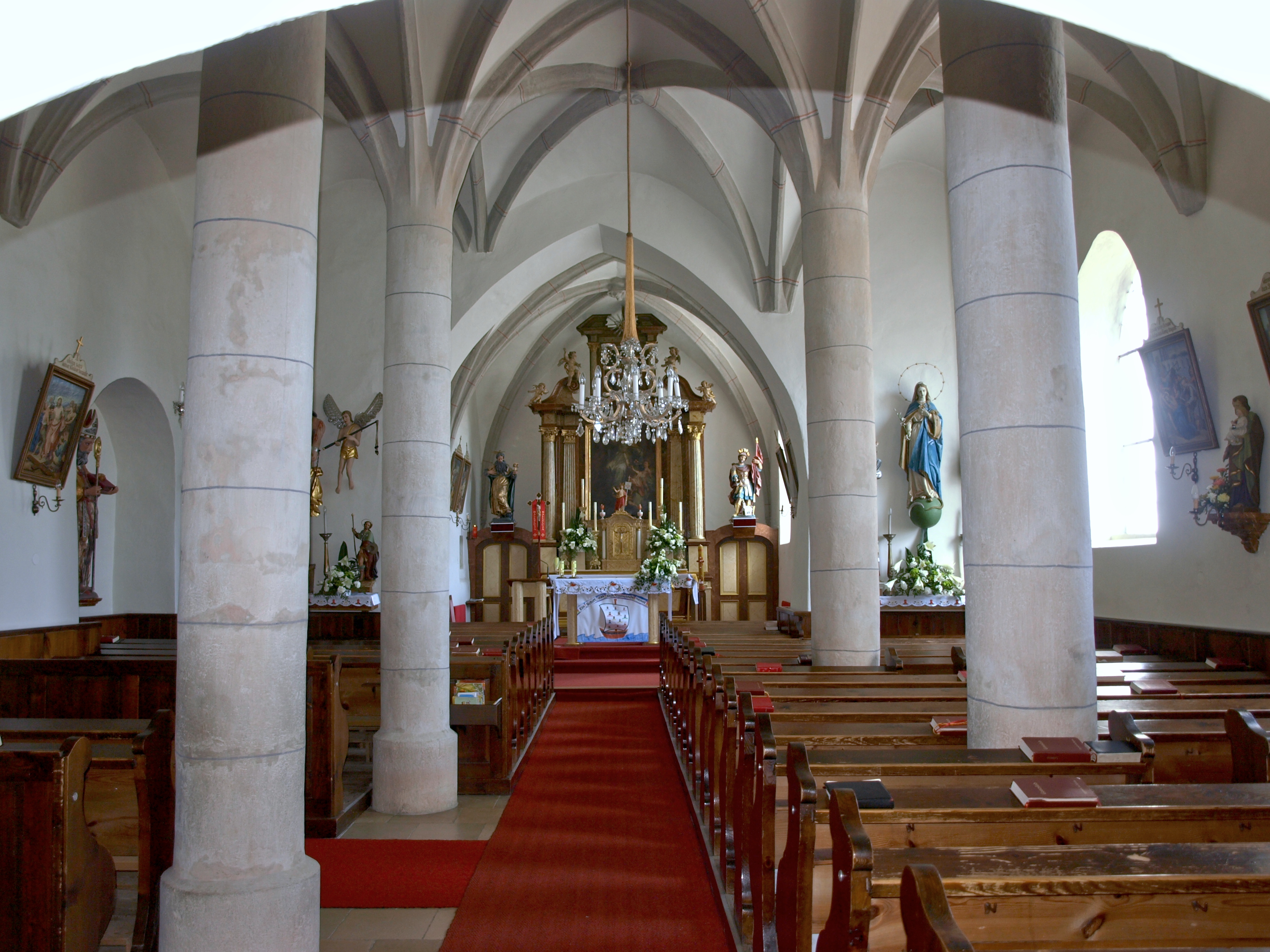 Kath. Pfarrkirche hl. Nikolaus und Friedhof